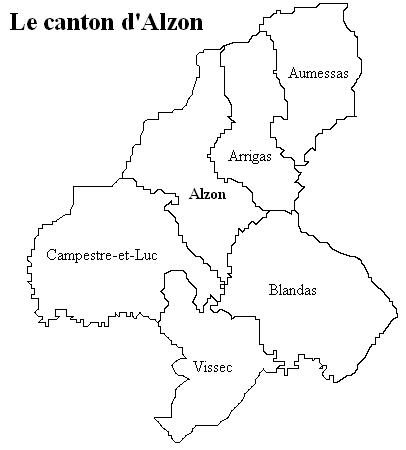 Le canton d'Alzon Image personnelle